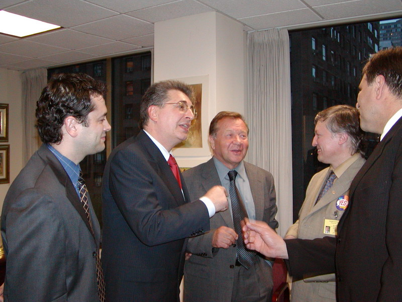 Опис: Средба во Њујорк, Трајковски, Керим, Петровски Автор: Филип Петровски